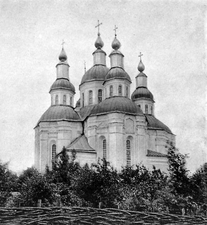 Свято-Успенський храм с. Лютенька 1910рр. фото ПОДА